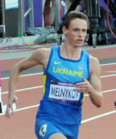 2ème demi finale du 400 haies aux JO de London 2012